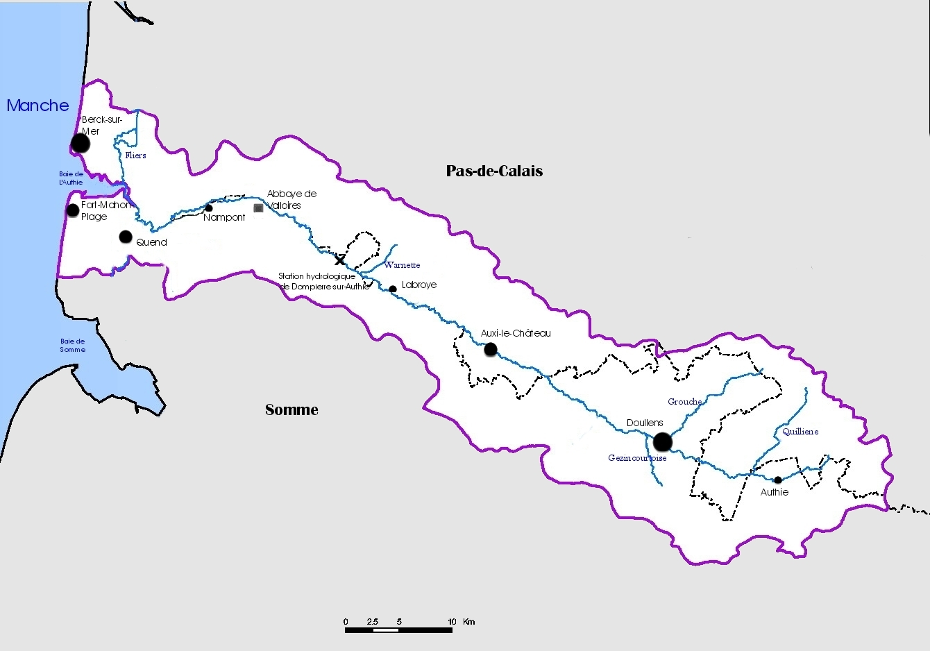 Bassin versant de l'Authie